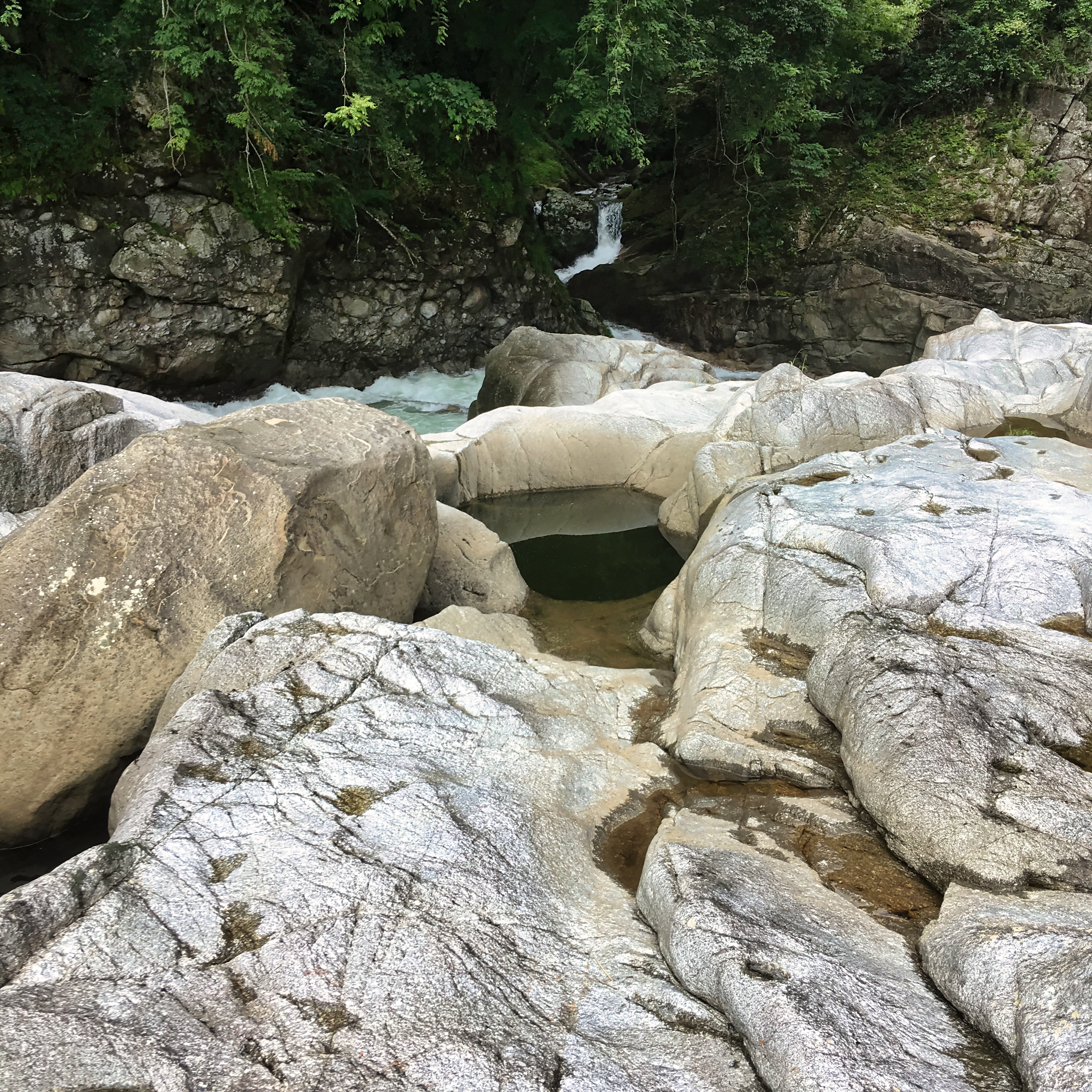 愛知県北設楽郡東栄町にある預り渕ポットホール